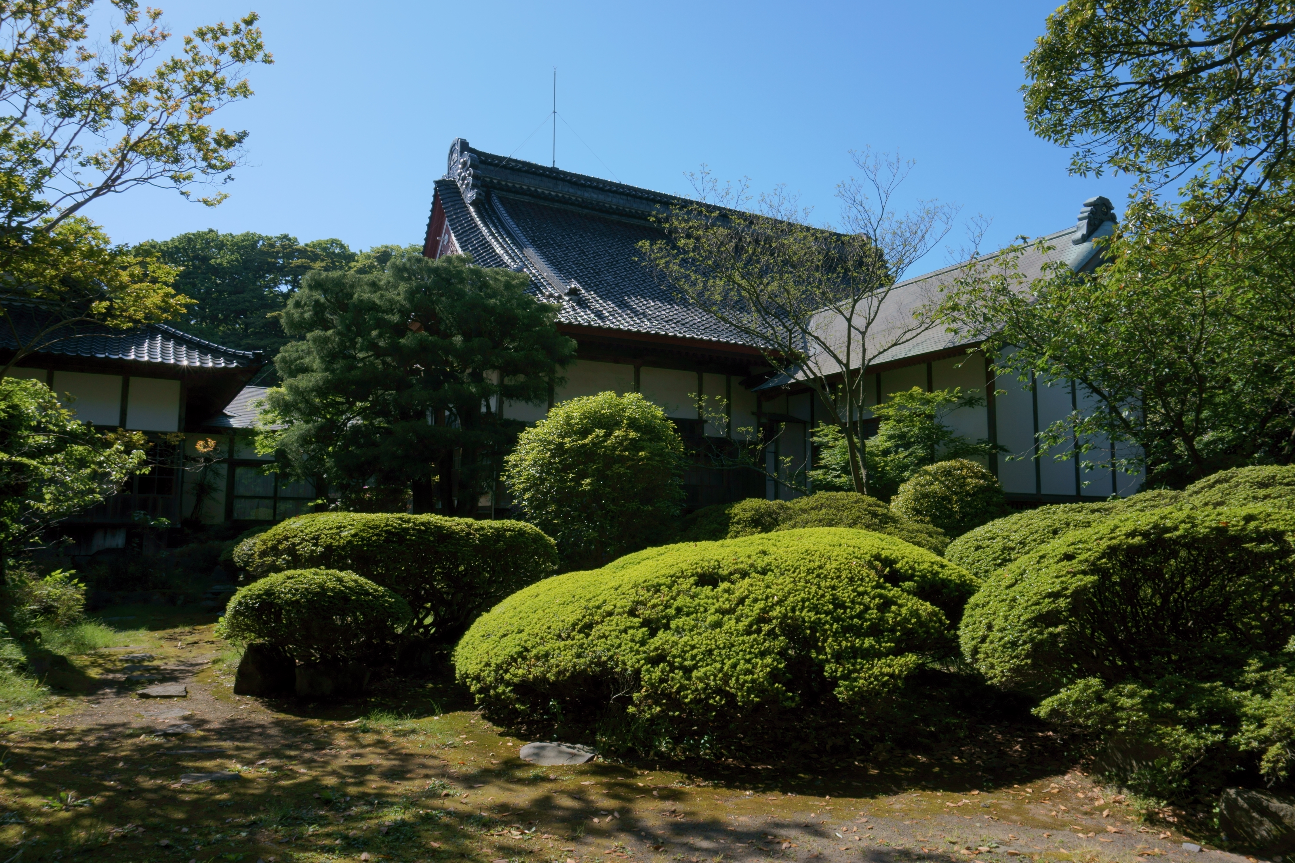 蚶満寺、庭園（秋田県にかほ市、象潟）